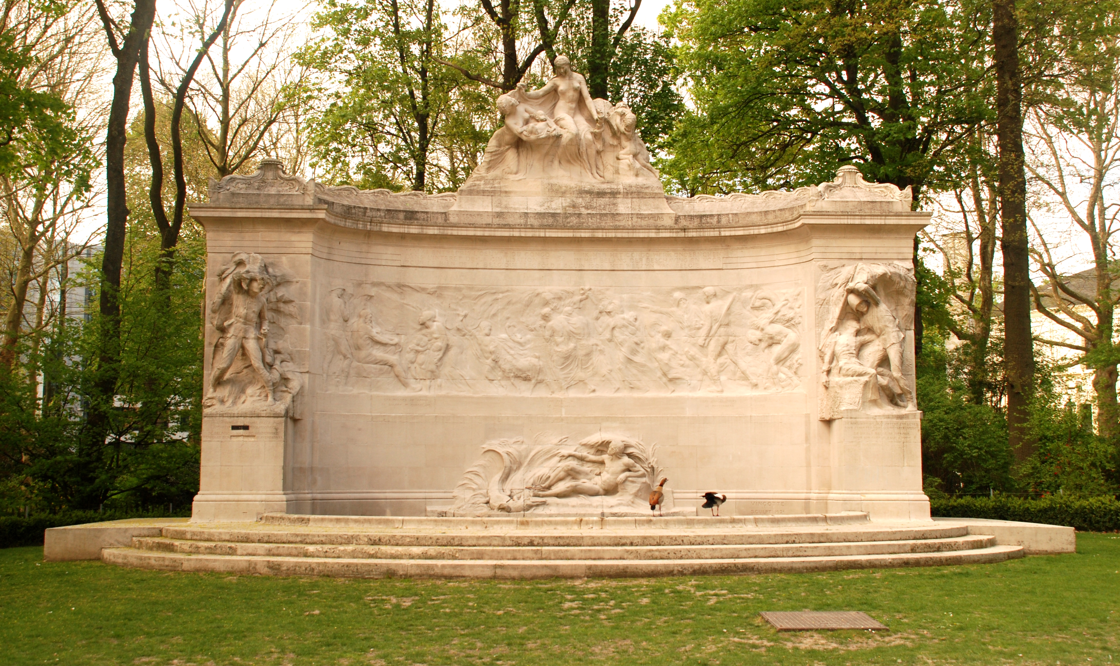 Belgique - Bruxelles - Monument aux pionniers belges au Congo